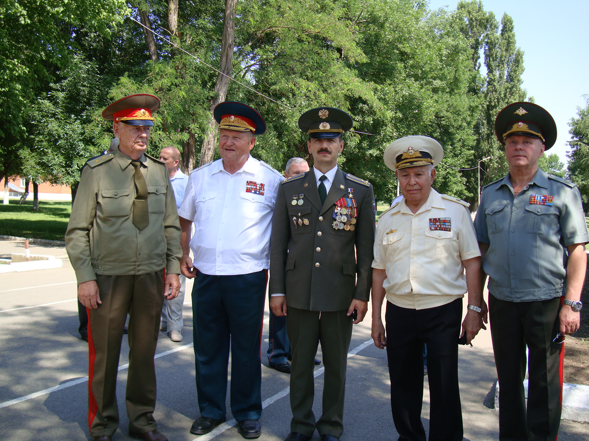 Шендрик Евгений Демьянович Герой России